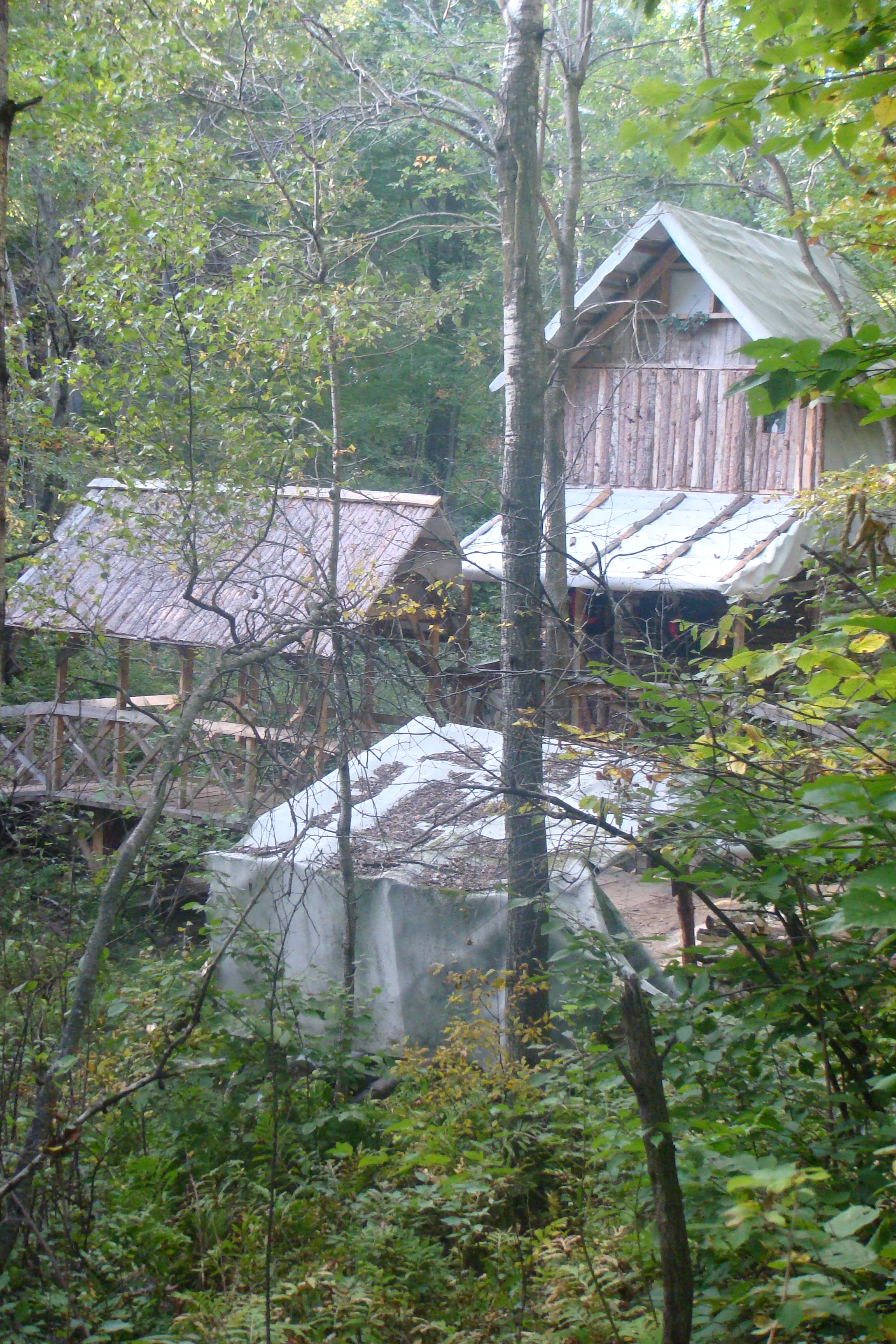 Paysage et construction des terres de Bélénos